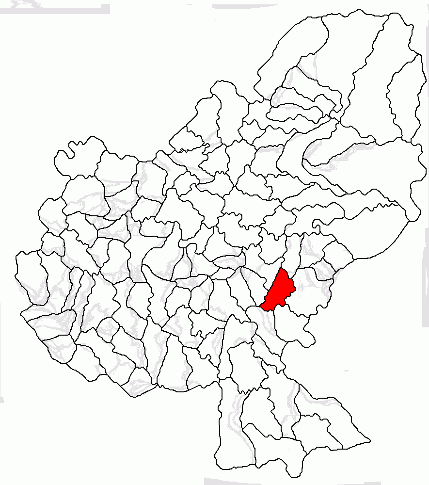 Categorie:Hărţi ale judeţului Mureş